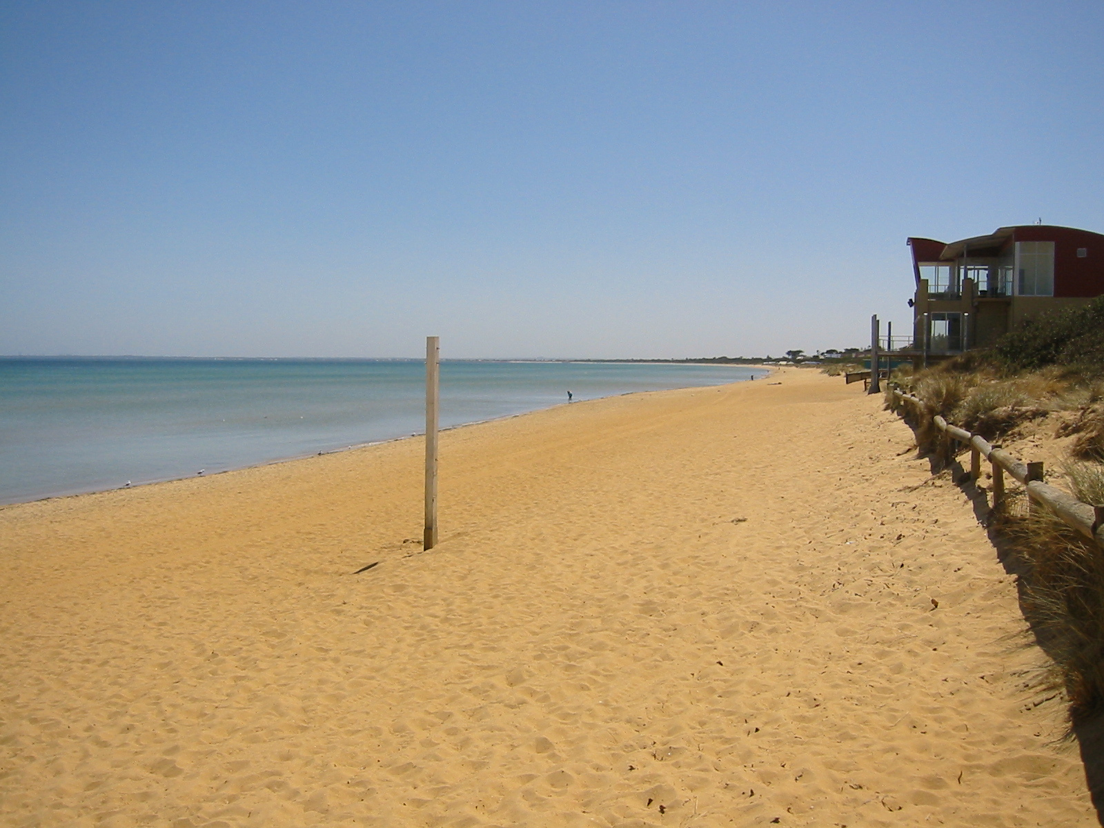 feiner Sandstrand vor den Toren von Melbourne, glasklares Wasser, es bleibt lange flach